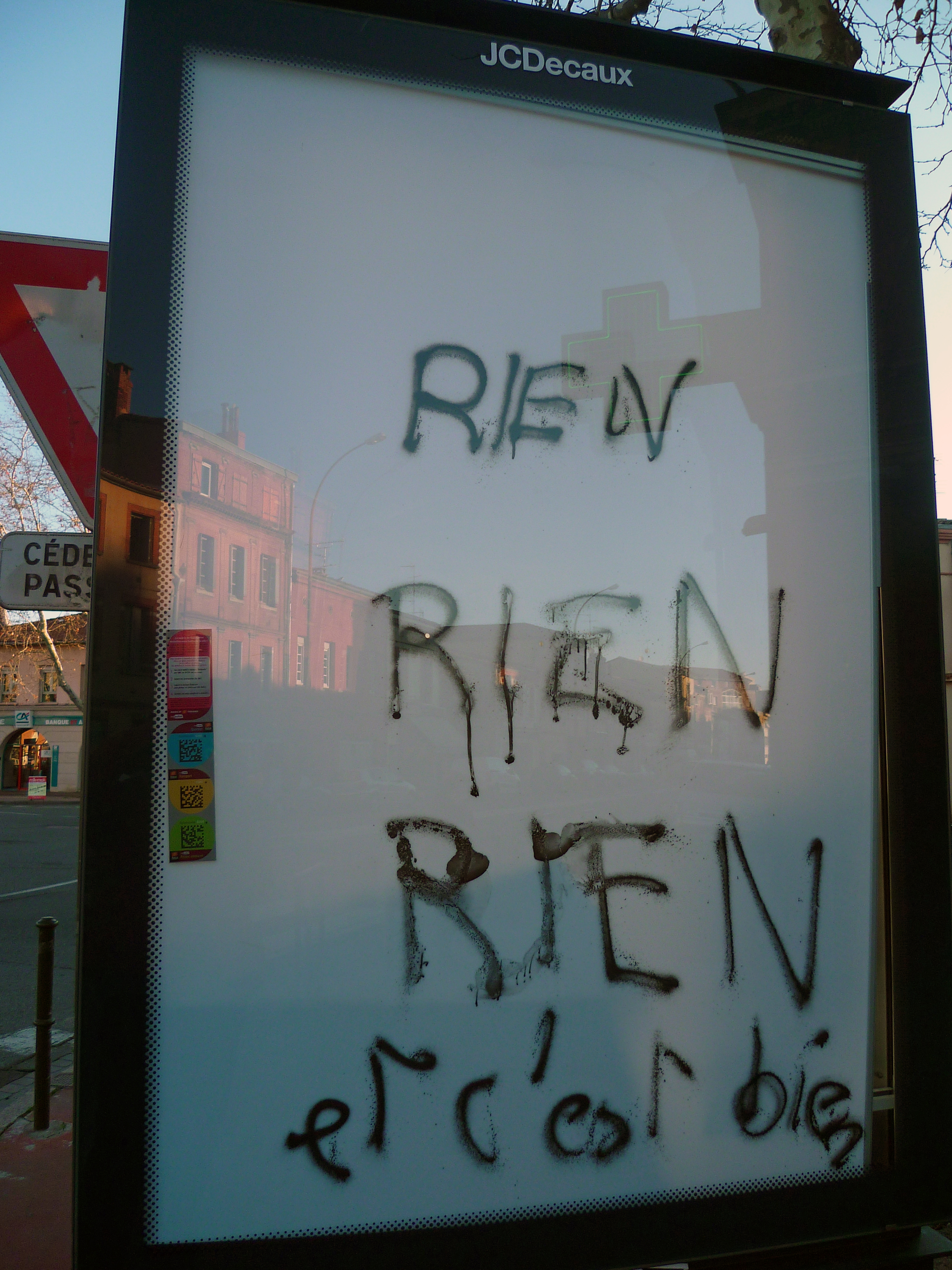 Toulouse (Haute-Garonne, France) : Panneau d'affichage publicitaire inutilisé avec un graffiti s'en réjouissant, place de la Patte d'Oie.